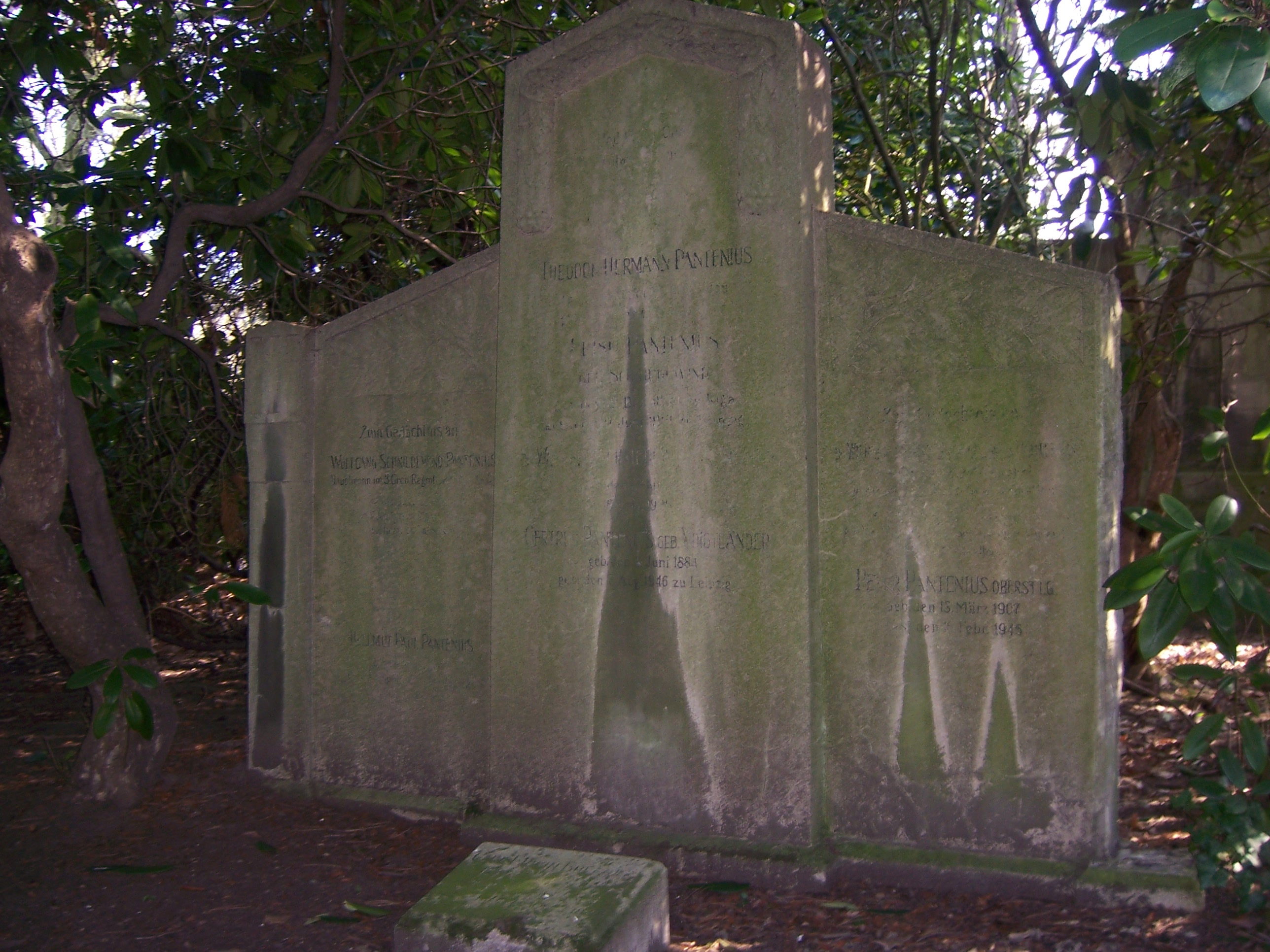 Grabmal der Familie Theodor Hermann Pantenius